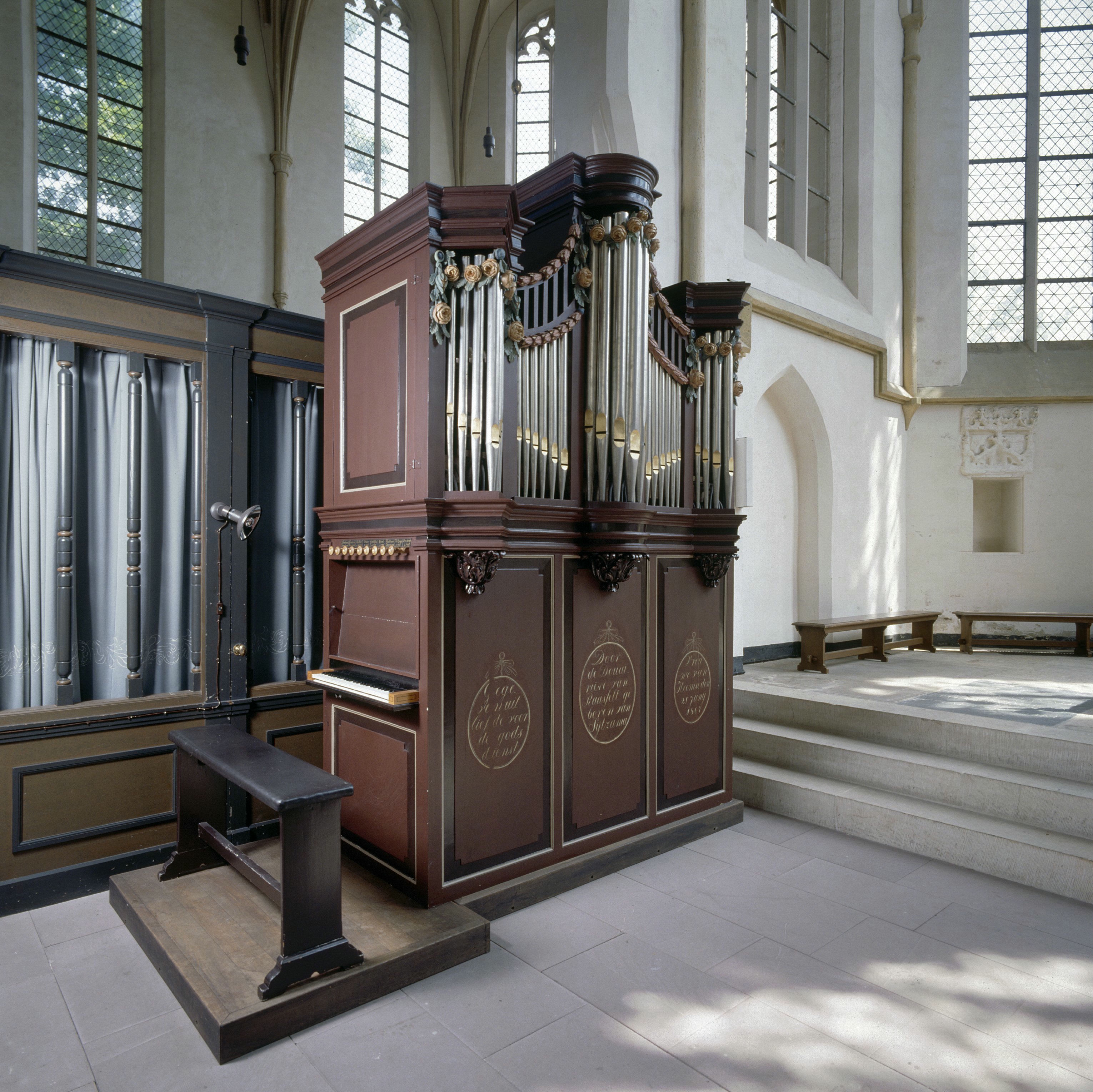 Nederlands Hervormde kerk (St. Gudula): Interieur, aanzicht koororgel, orgelnummer 892 (opmerking: Gefotografeerd voor Het Historische Orgel in Nederland 1790-1818. Gestiftet von Clara Feyoena van Sytzama